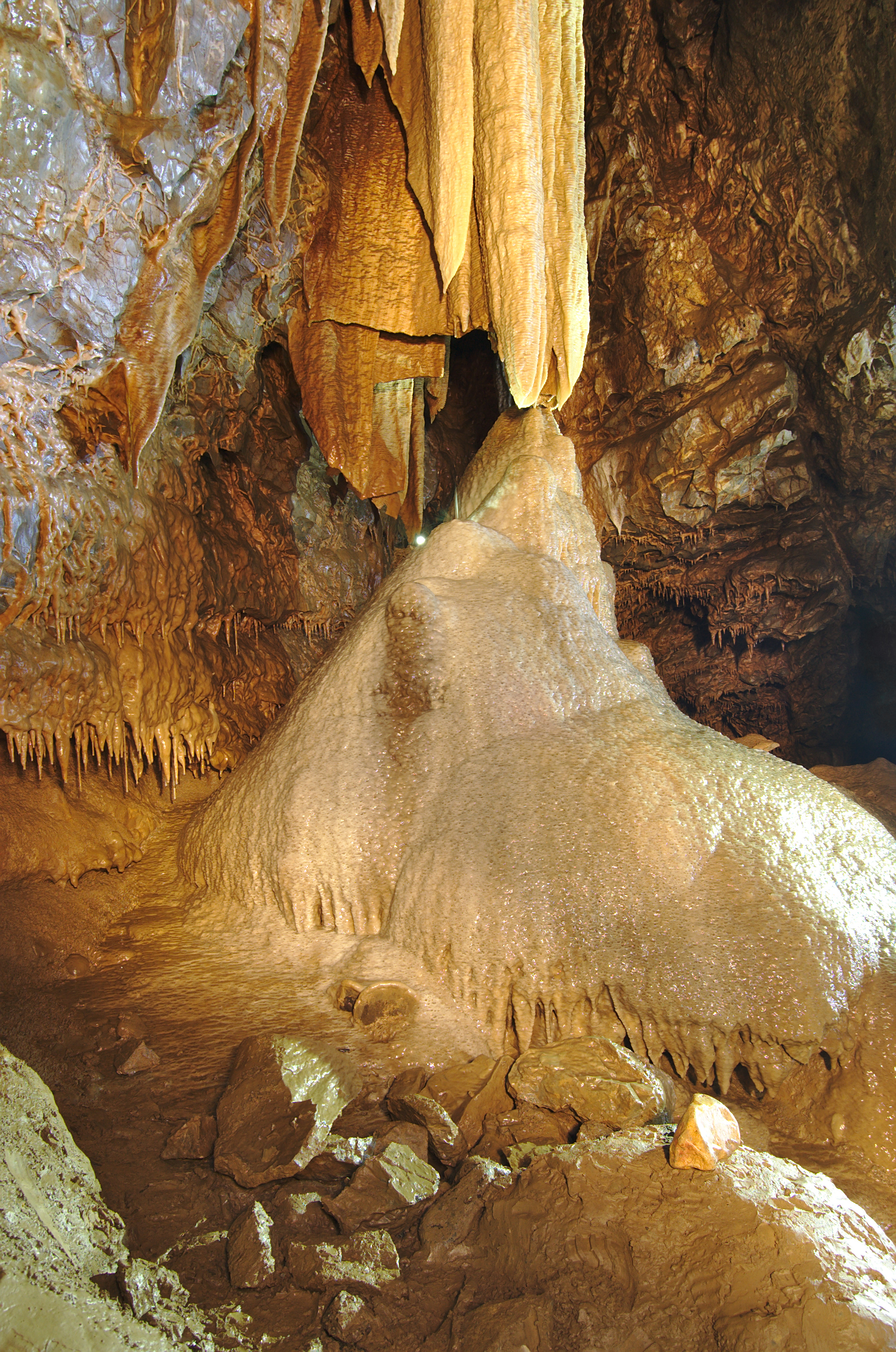 Nová Amatérská jeskyně, Moravský kras